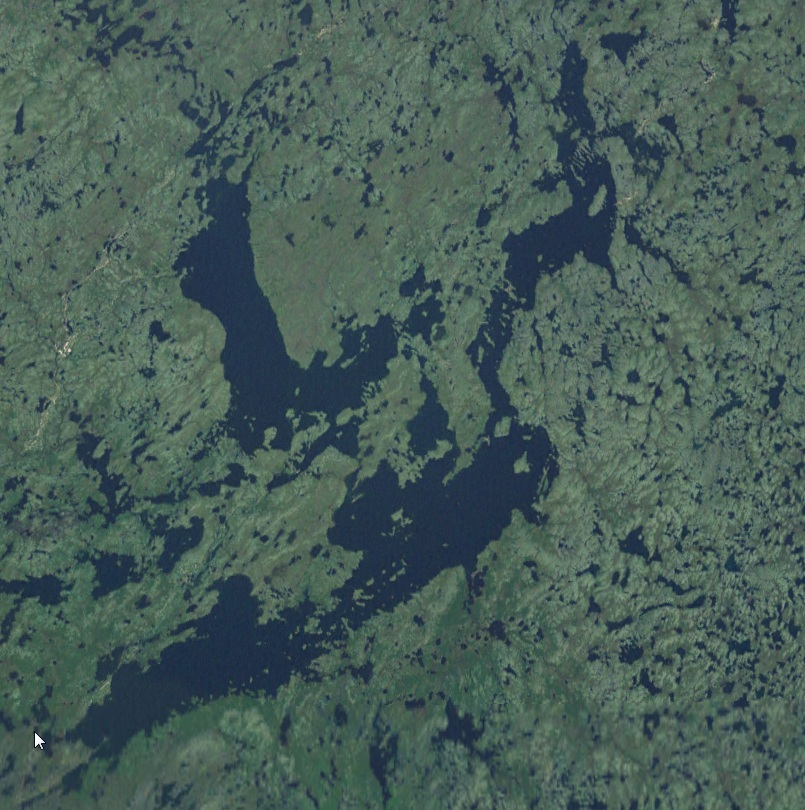 Lac Ennadai, Nunavut